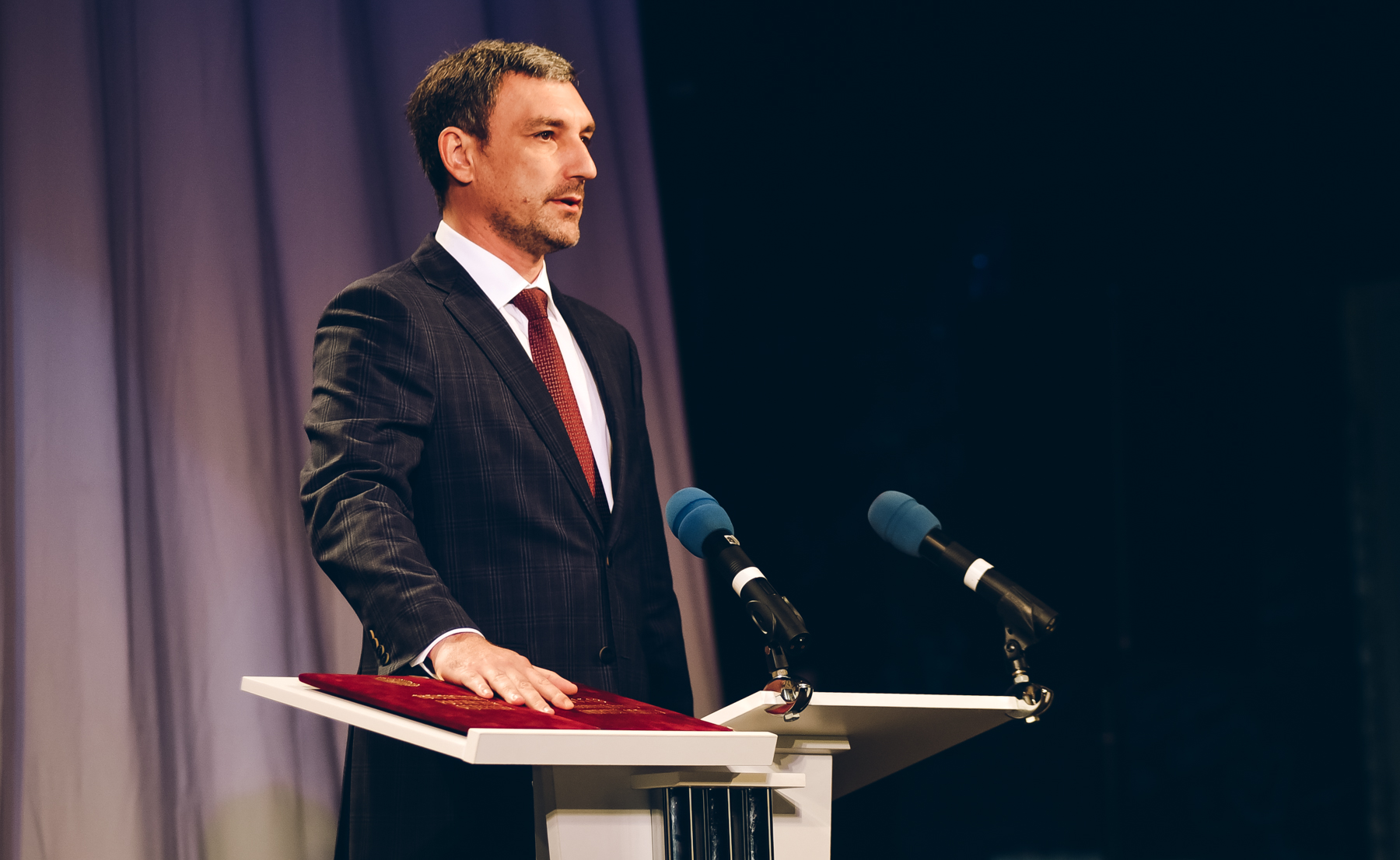 В Амурской области прошла инаугурация нового руководителя региона